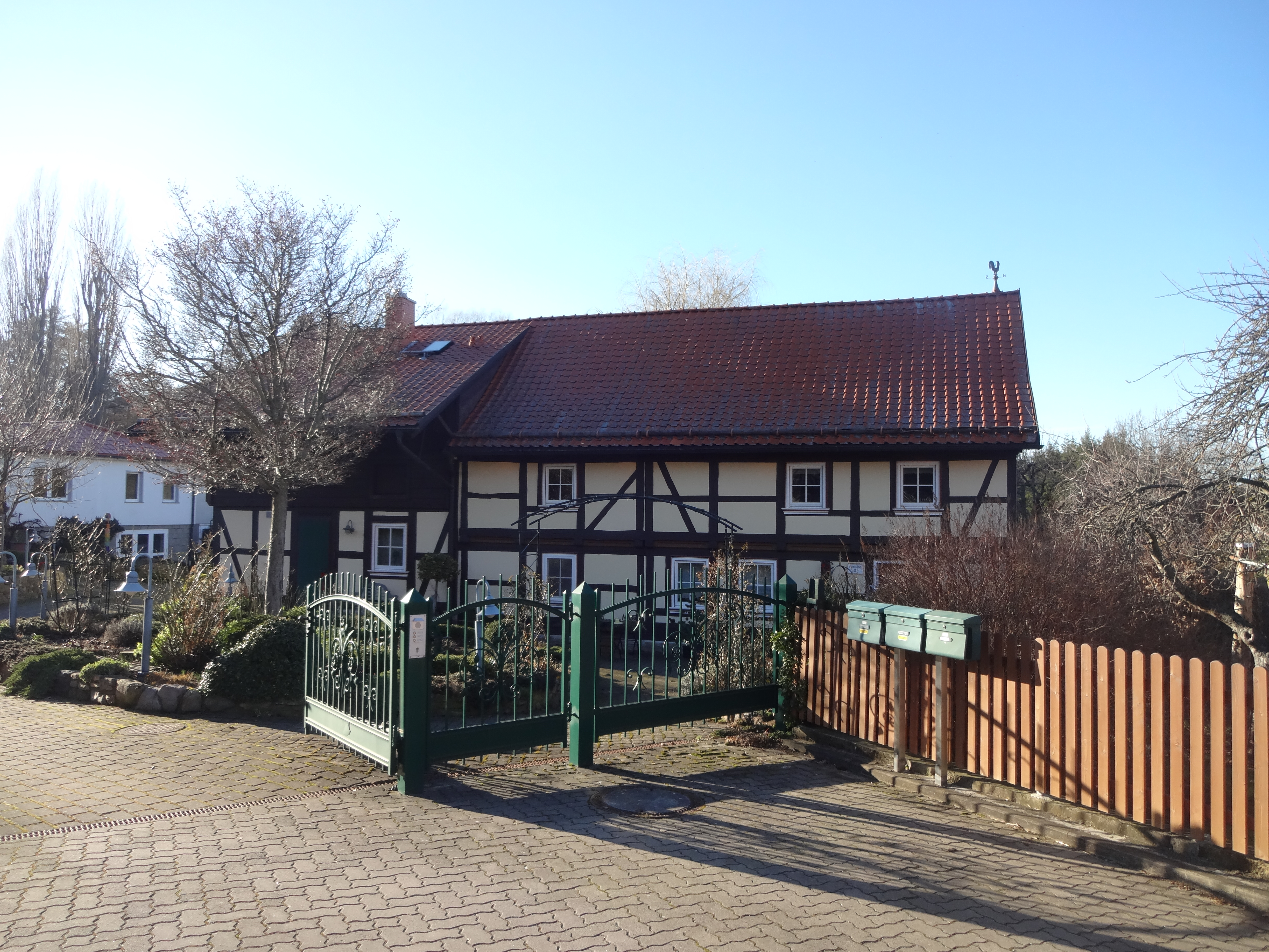 denkmalgeschütztes Wohnhaus in der Hirtengasse 2 in Darlingerode